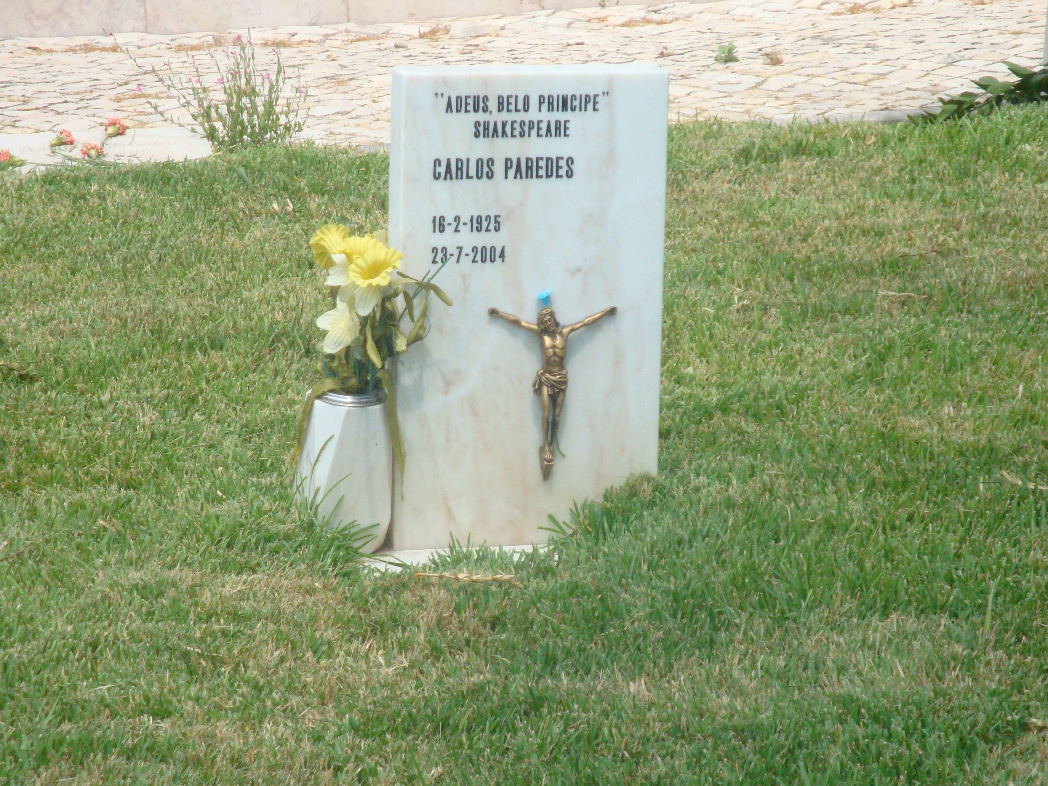 Lapide de Carlos Paredes; Cemitério dos Prazeres; Lisboa